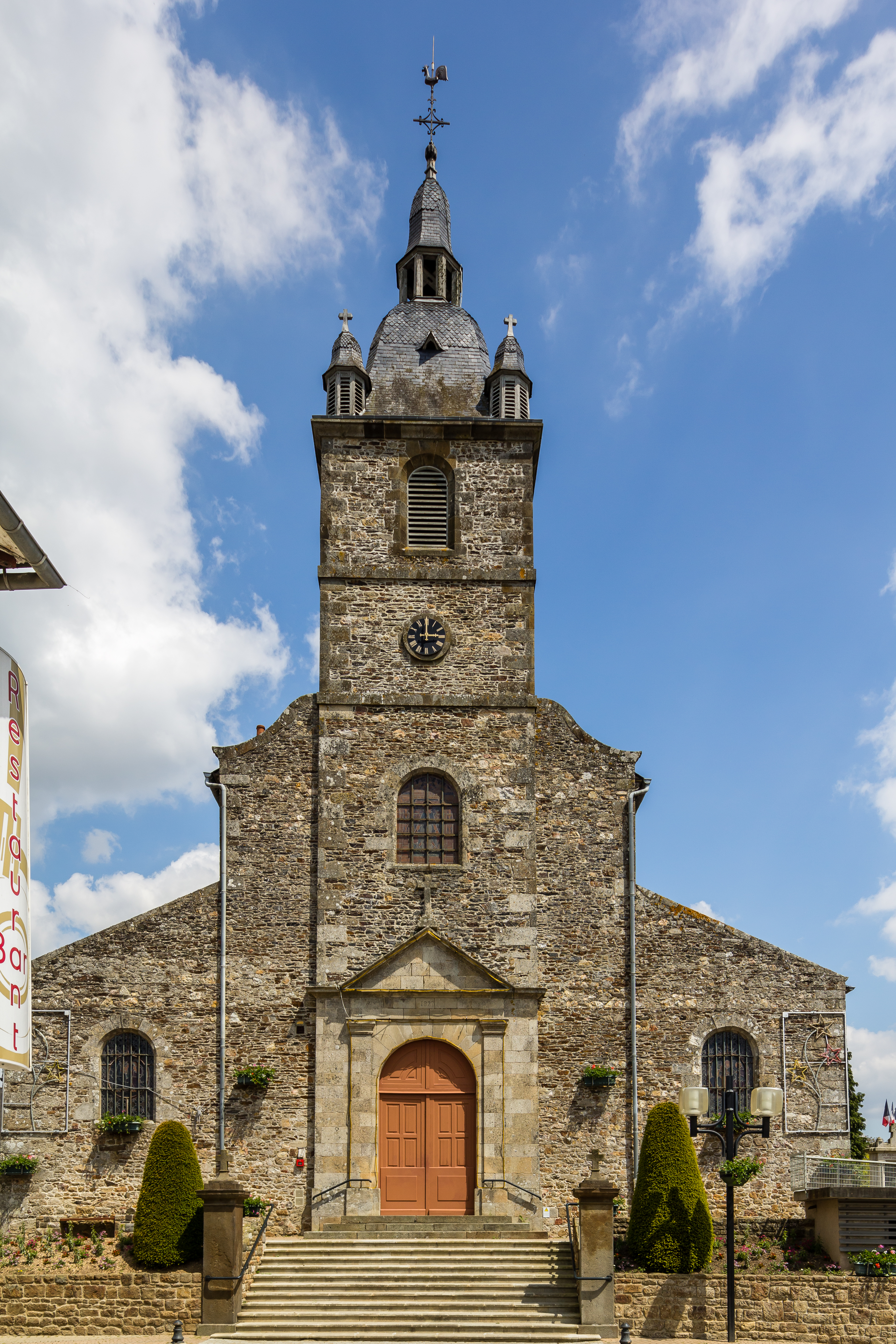 Façade de l'église Saint-Pierre d'Irodouër (France).